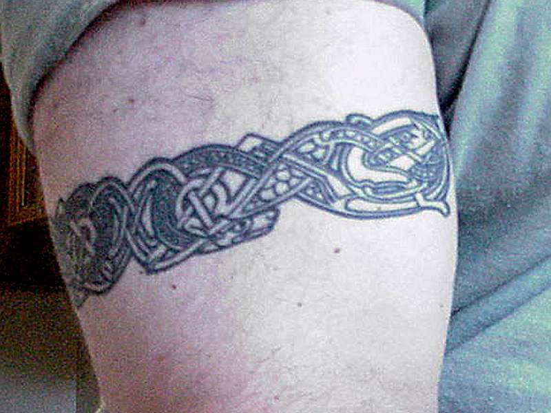 Celtic tattoo